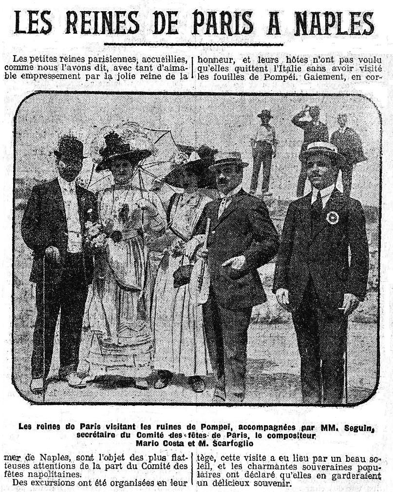 Article sur le voyage des Reines de la Mi-Carême de Paris à Naples en 1910.